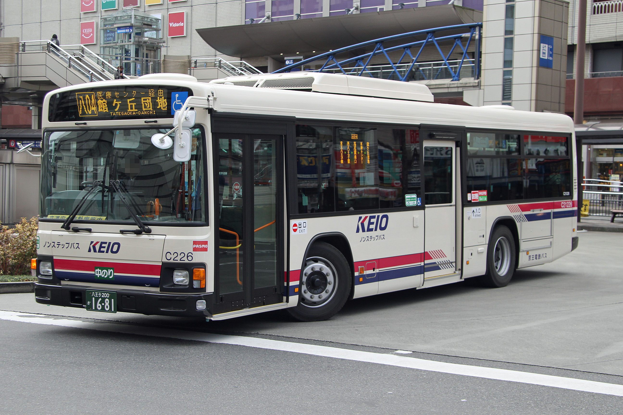 Keio Dentetsu Bus car 京王電鉄バスの車両